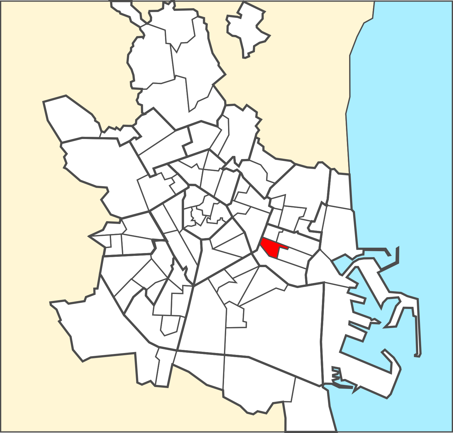 Localització del barri dins de la ciutat de València.